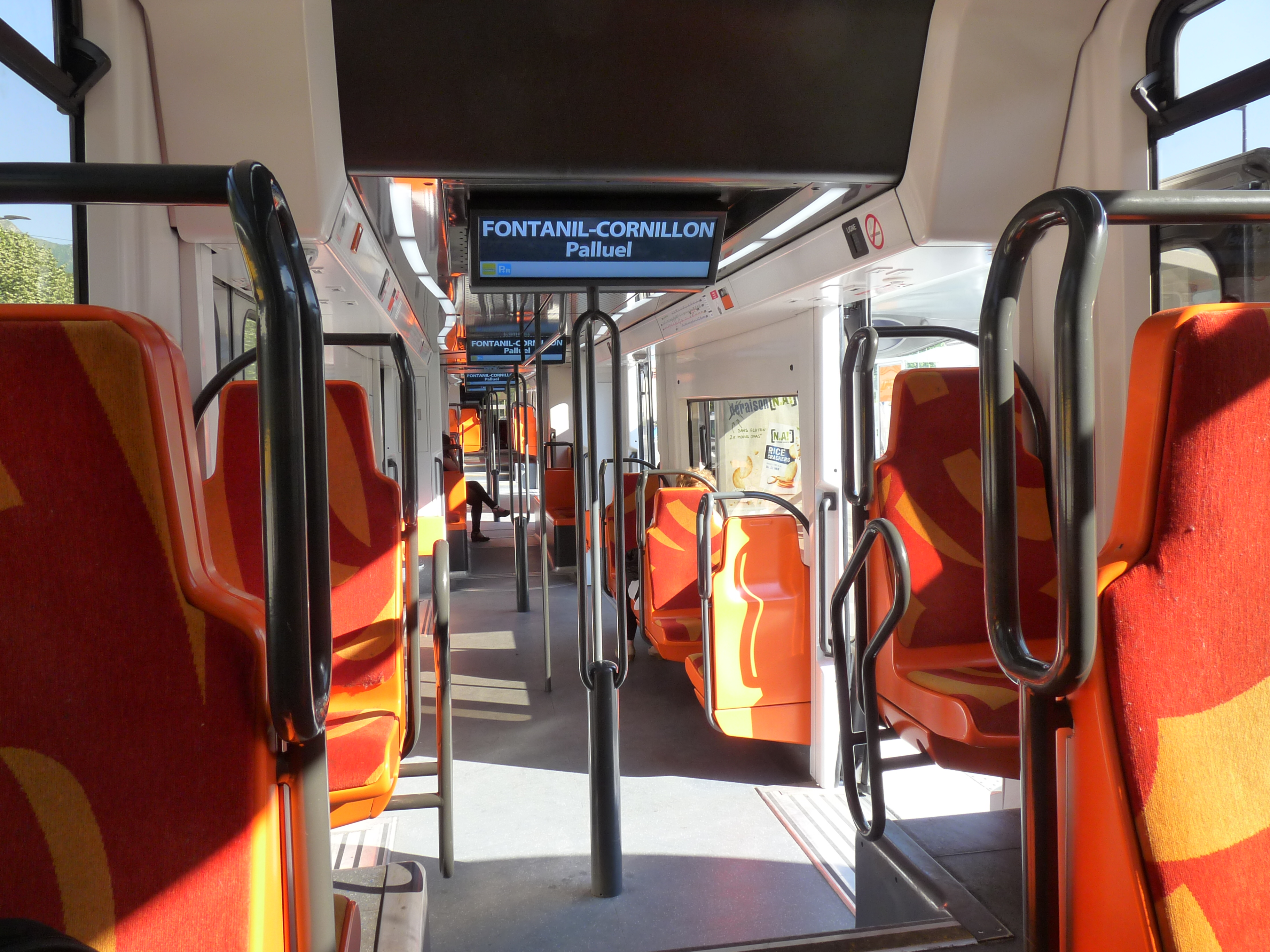 Trams in Grenoble